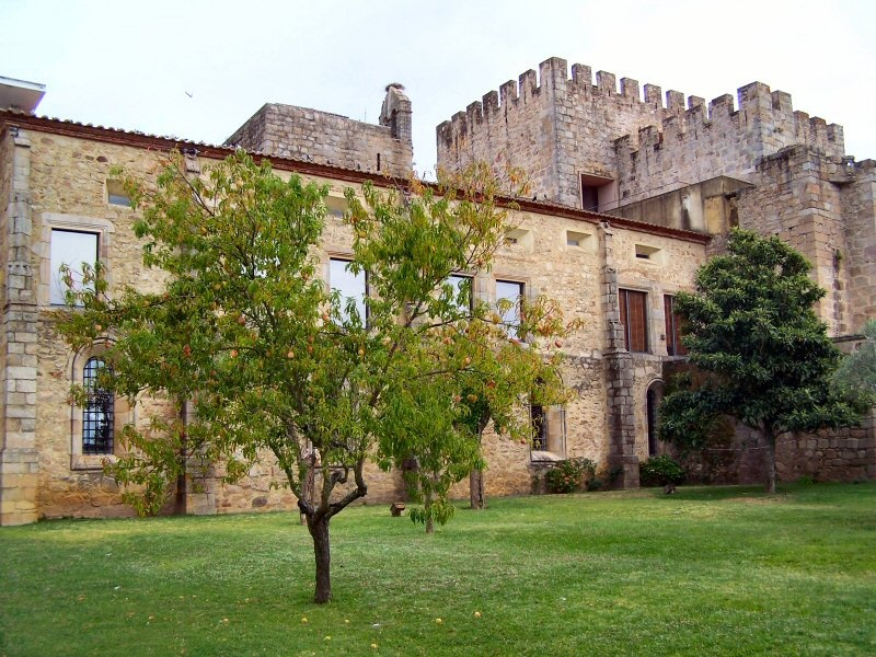 Flor da Rosa é uma freguesia portuguesa do concelho do Crato, com 10.4 km² de área e 328 habitantes (2001). Densidade: 33,2 hab/km².